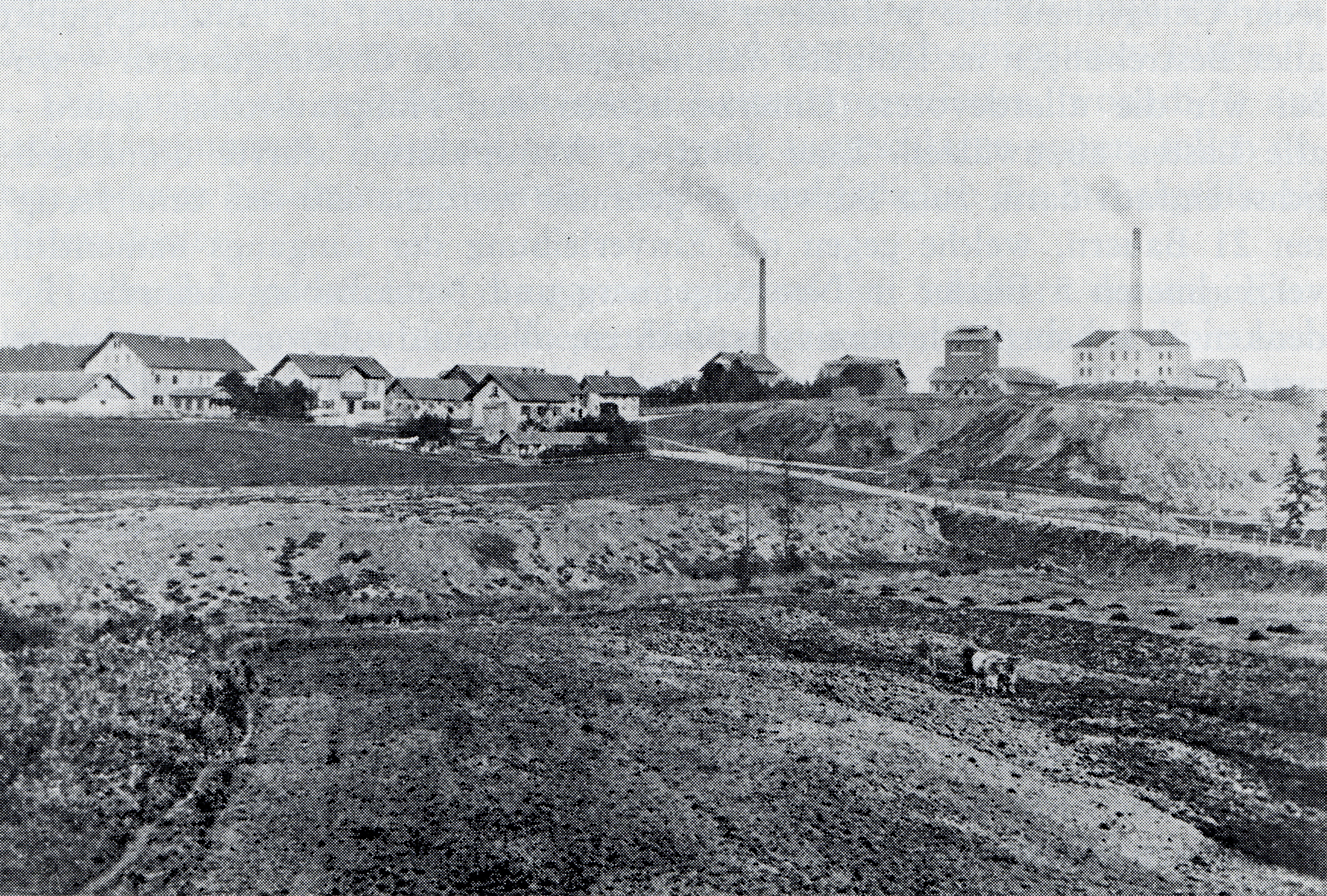 Blick zum Schachthügel, links oben der Gasthof „Zum Berggeist“. Im Vordergrund das Gelände auf dem 1890 die Kirche errichtet wurde.